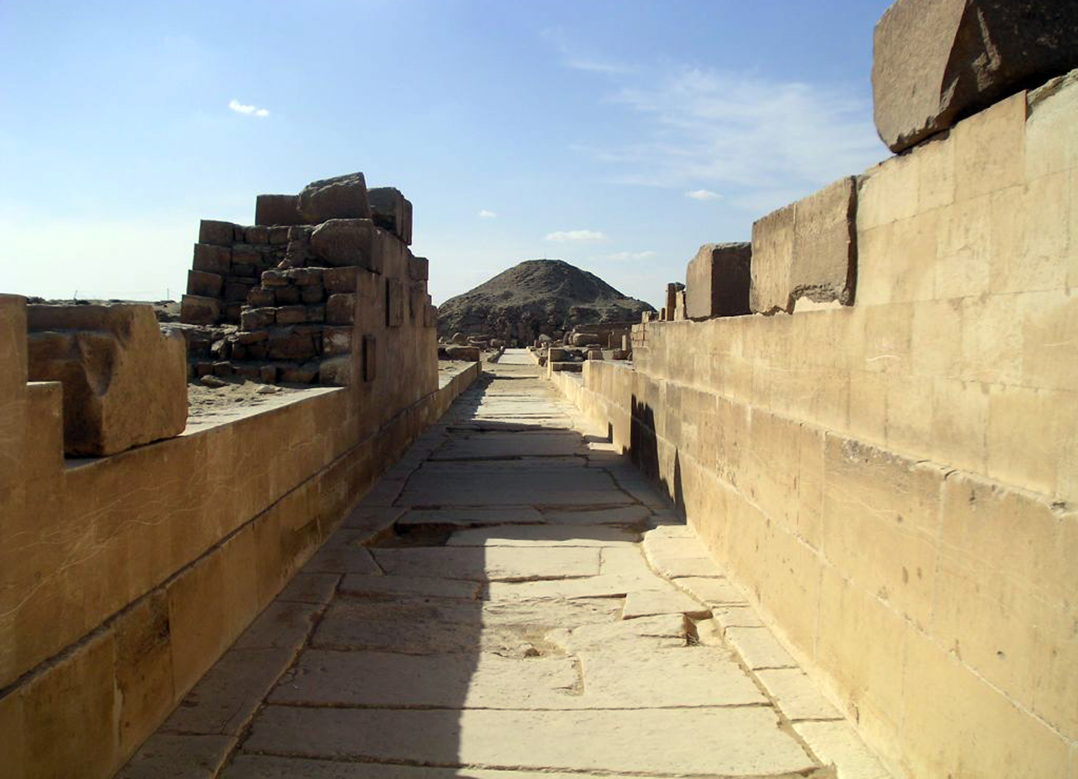 Aufweg zur Pyramide des Unas in Sakkara, Ägypten, 5. Dynastie, um 2350 v. Chr.